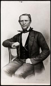 German / Norwegian composer Friedrich August Reissiger (1809-1883)